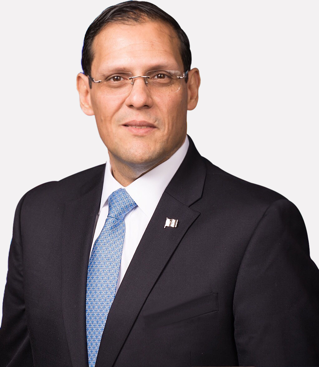 Lisandro Rosales Banegas Nació en la ciudad de Tegucigalpa, municipio del Distrito Central, el 26 de diciembre de 1969.